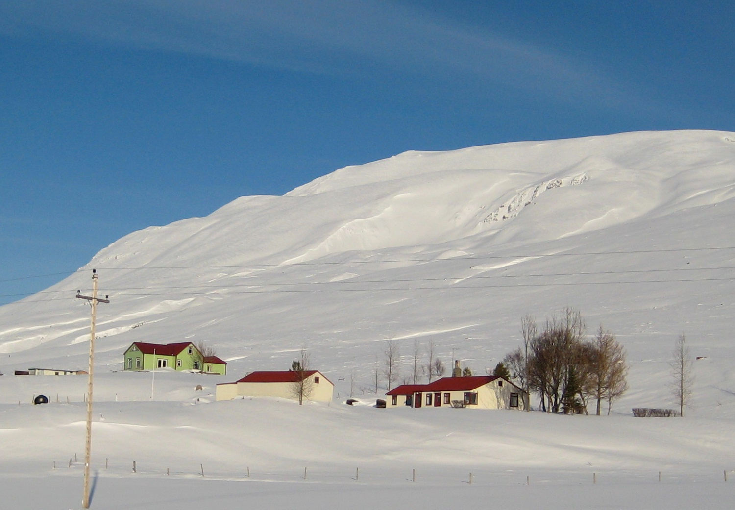 Skegggsstaðir í Svarfaðardal